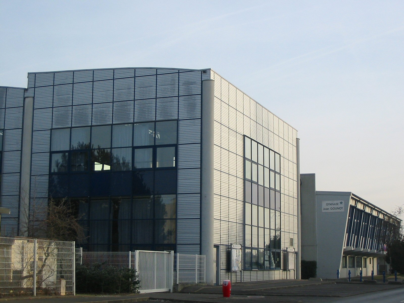 Gymnase Jean Gounot à Brunoy (Essonne).